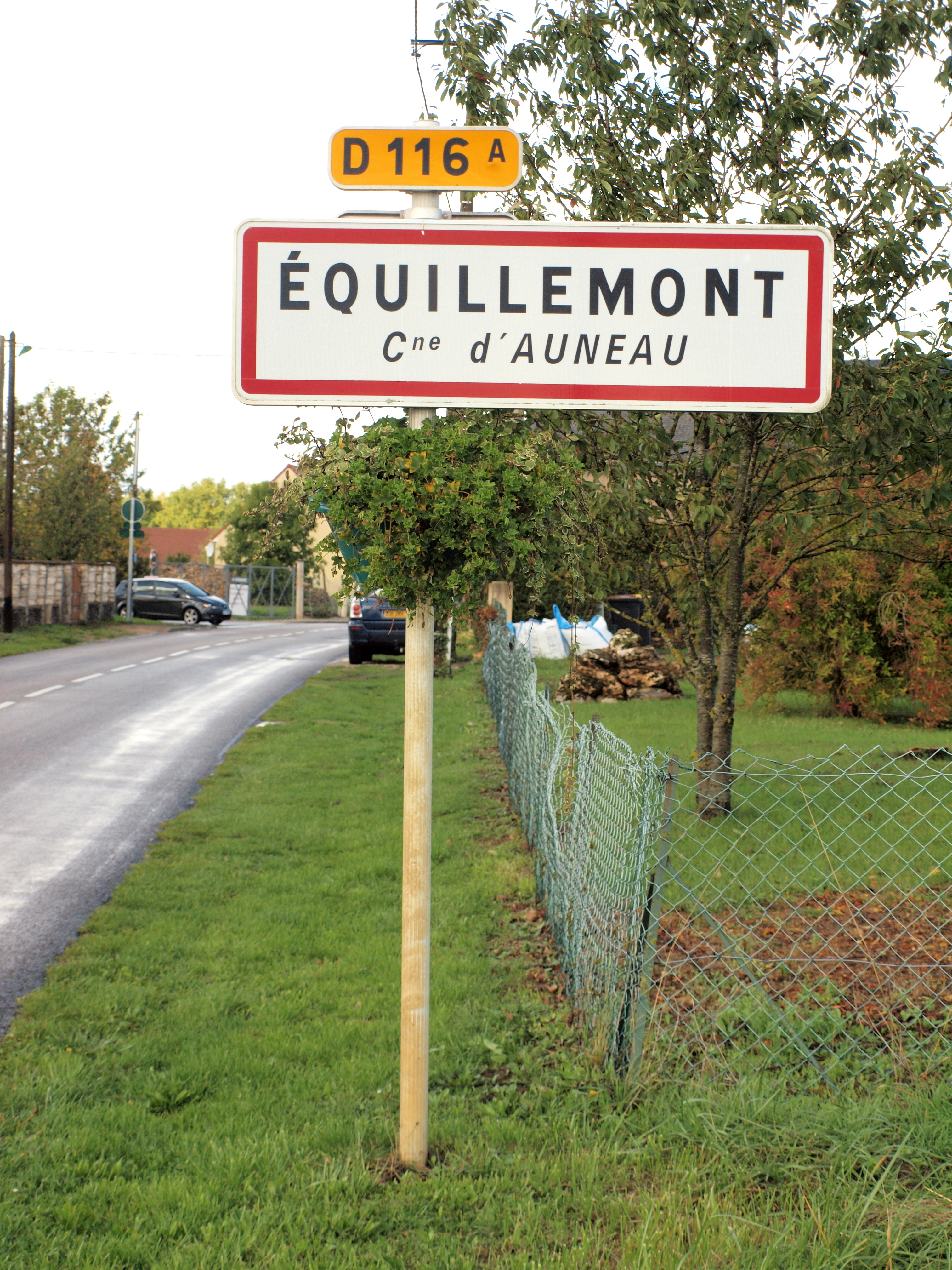 Équillemont, hameau de la commune d'Auneau en Eure-et-Loir (France).